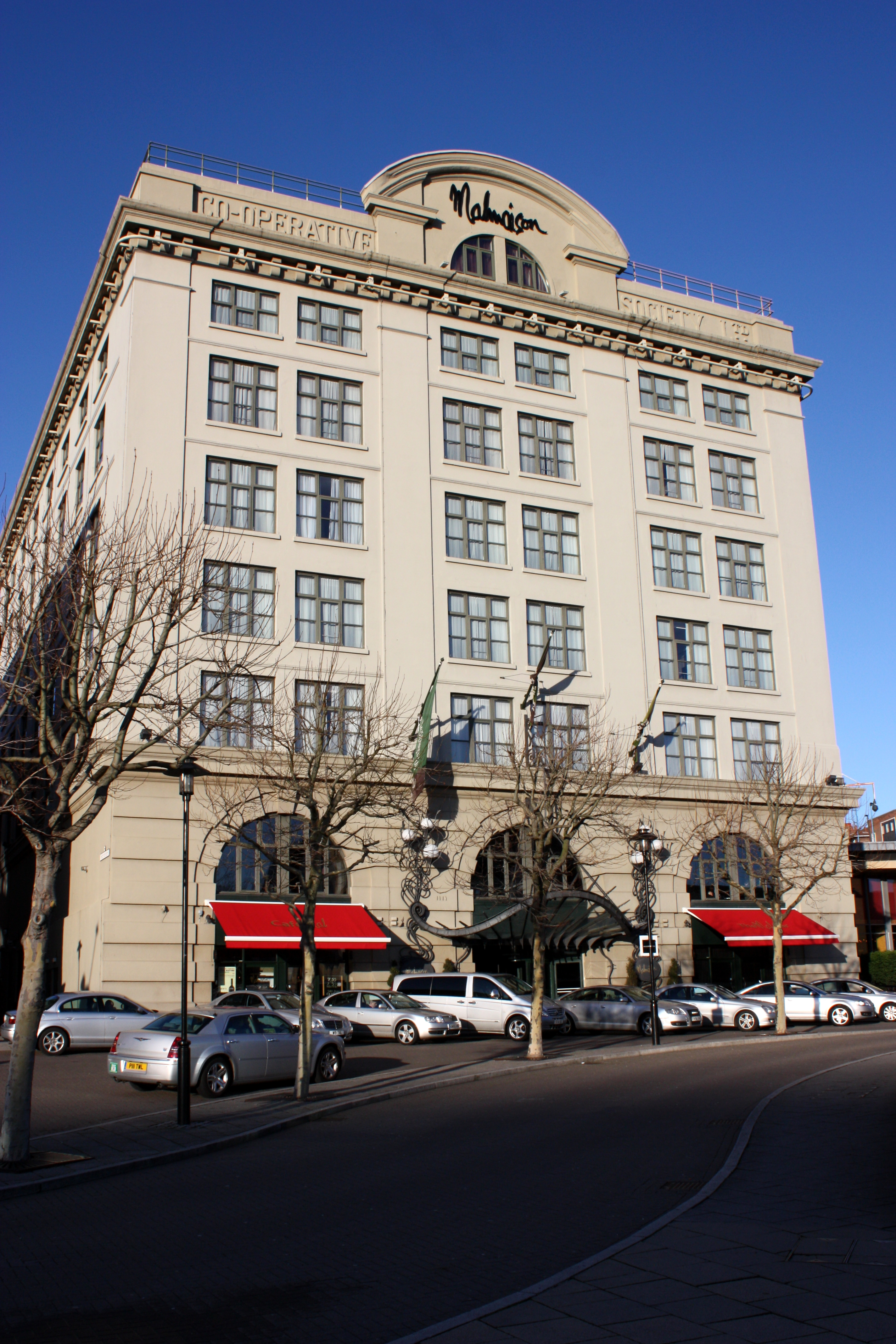 Malmaison